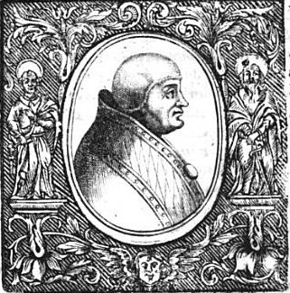 Lucius II.